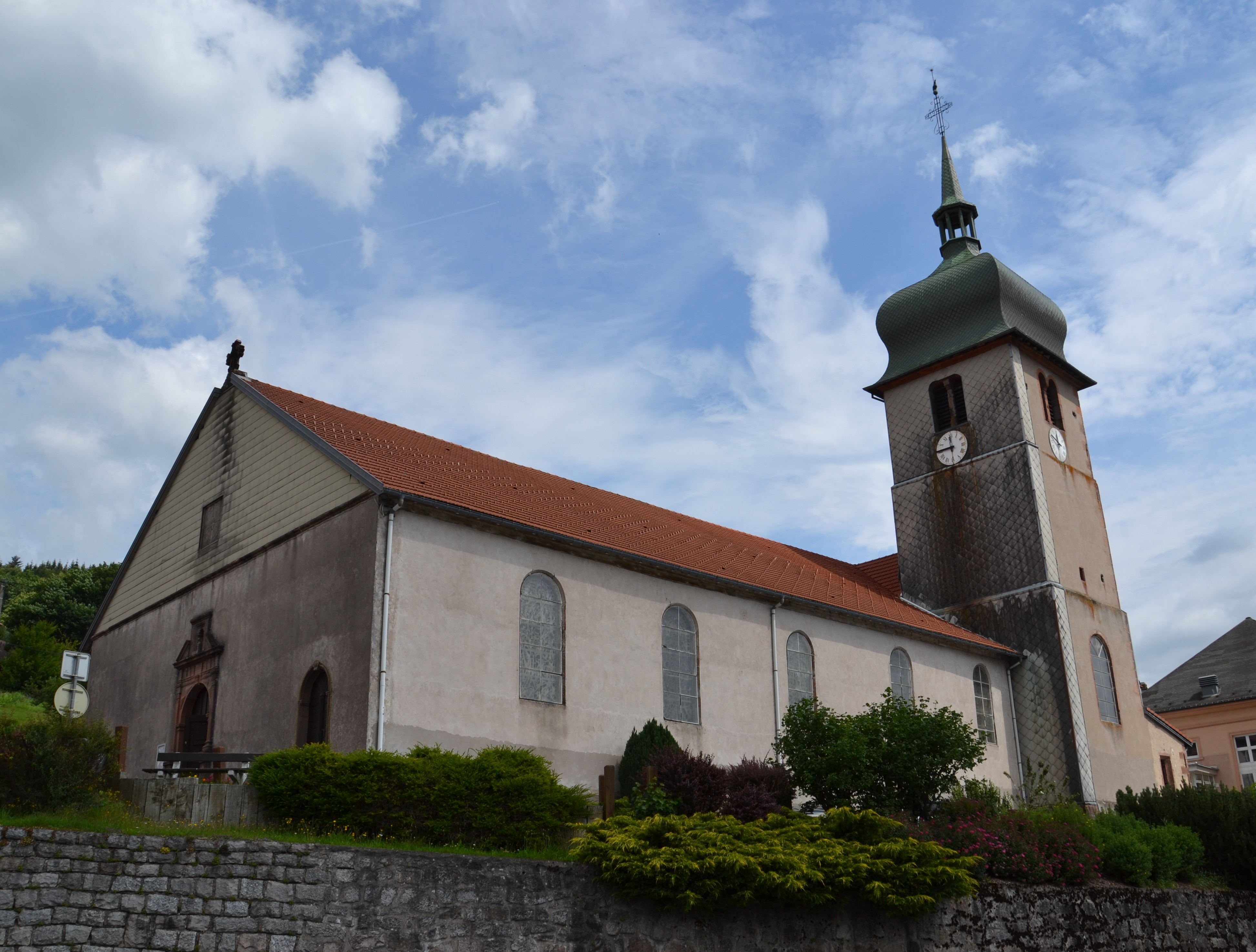 Église saint Joseph, Le Tholy, Vosges.